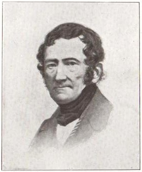 Carl Albert von Stengel (1784-1865) Regierungspräsident der Pfalz und von von Schwaben